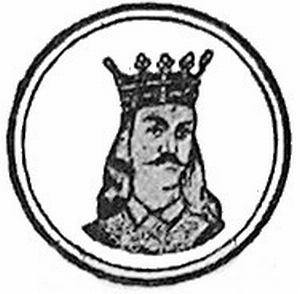 Radu der Schöne. Fürst Radu cel Frumos.